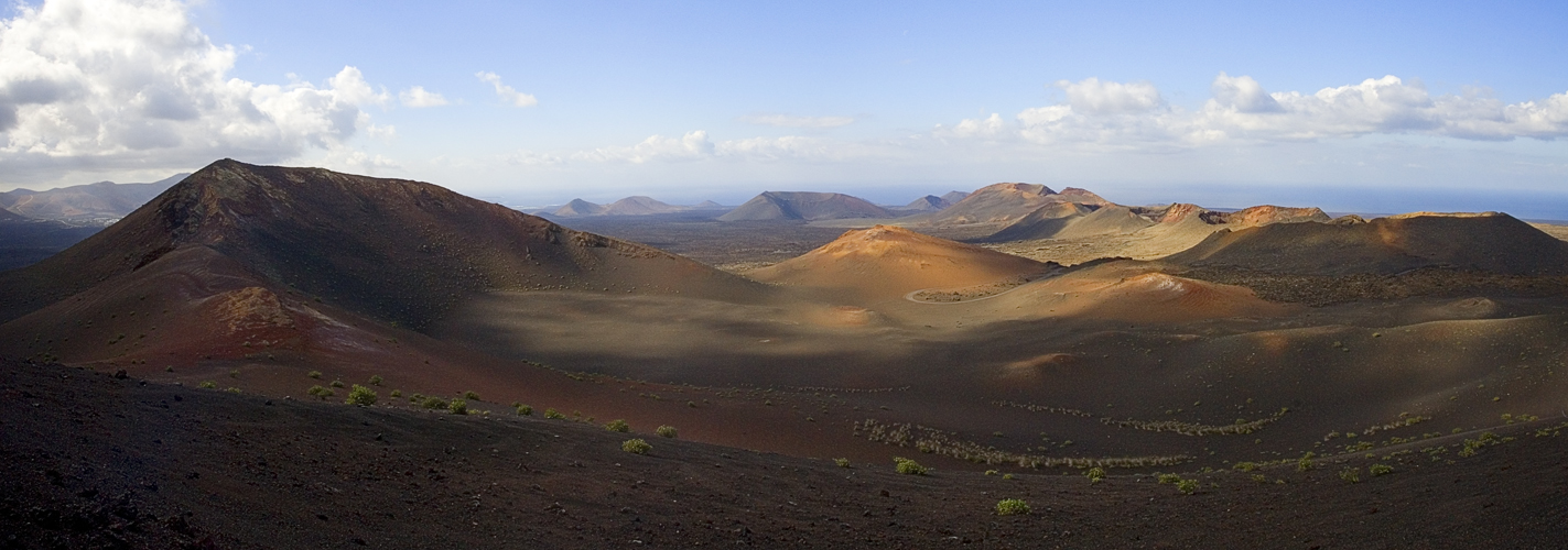 Timanfaya National Park, Lanzarote